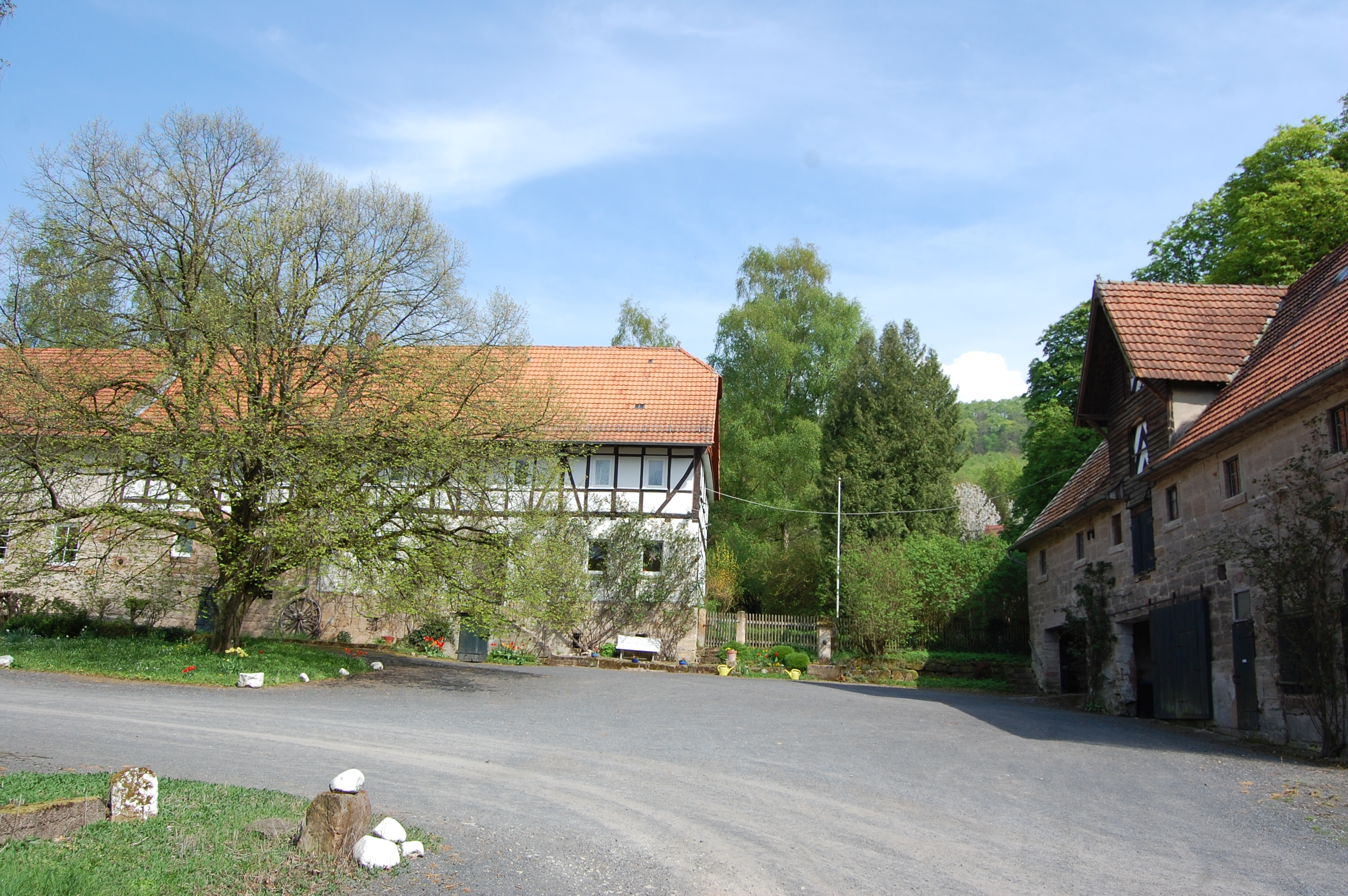 Gut Boyneburgk (Wirtschaftshof), 22.04.2018